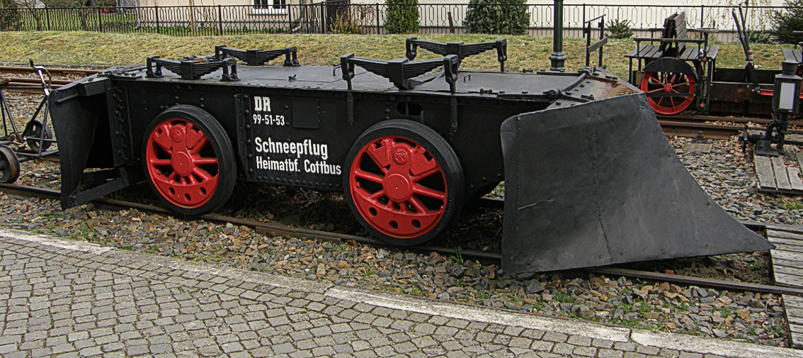 Schneepflug der Spreewaldbahn, aus dem Rahmen einer B-gekuppelten Dampflokomotive gebaut.